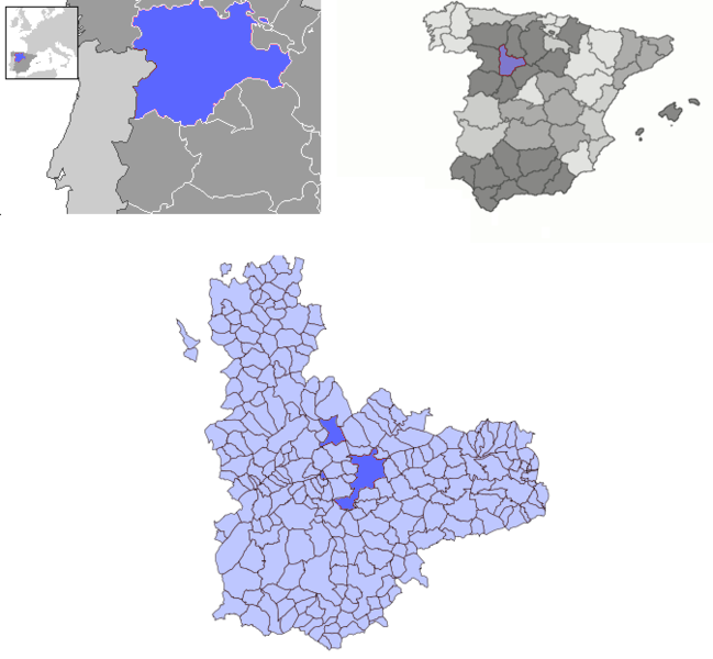 Situación de Valladolid